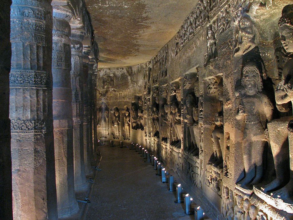 Ajanta, Inside a Cave